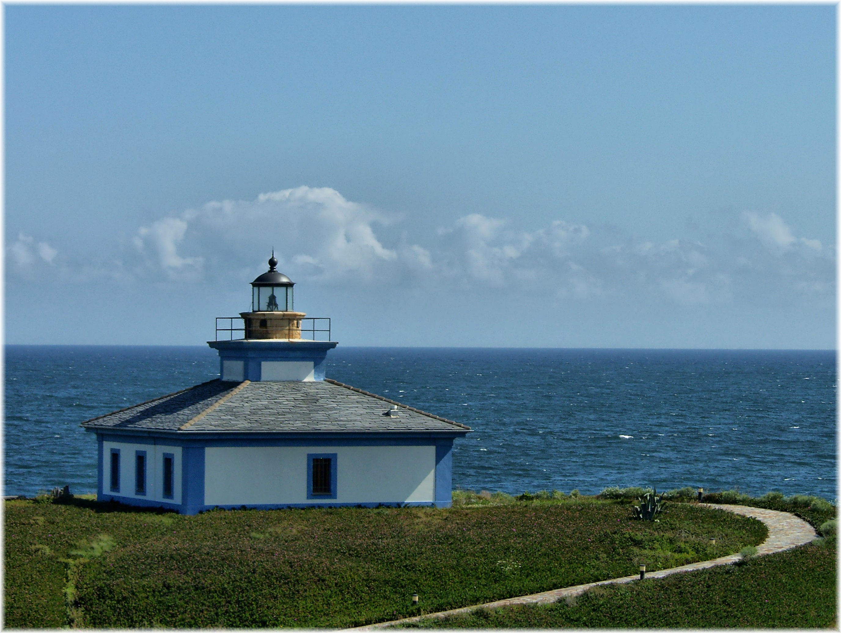 Faro da illa Pancha en Ribadeo (Galiza)